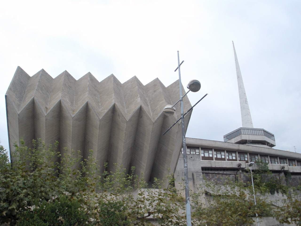 Pasajes de San Pedro - IES Náutico Pesquero de Pasaia-Blas de Lezo BHI